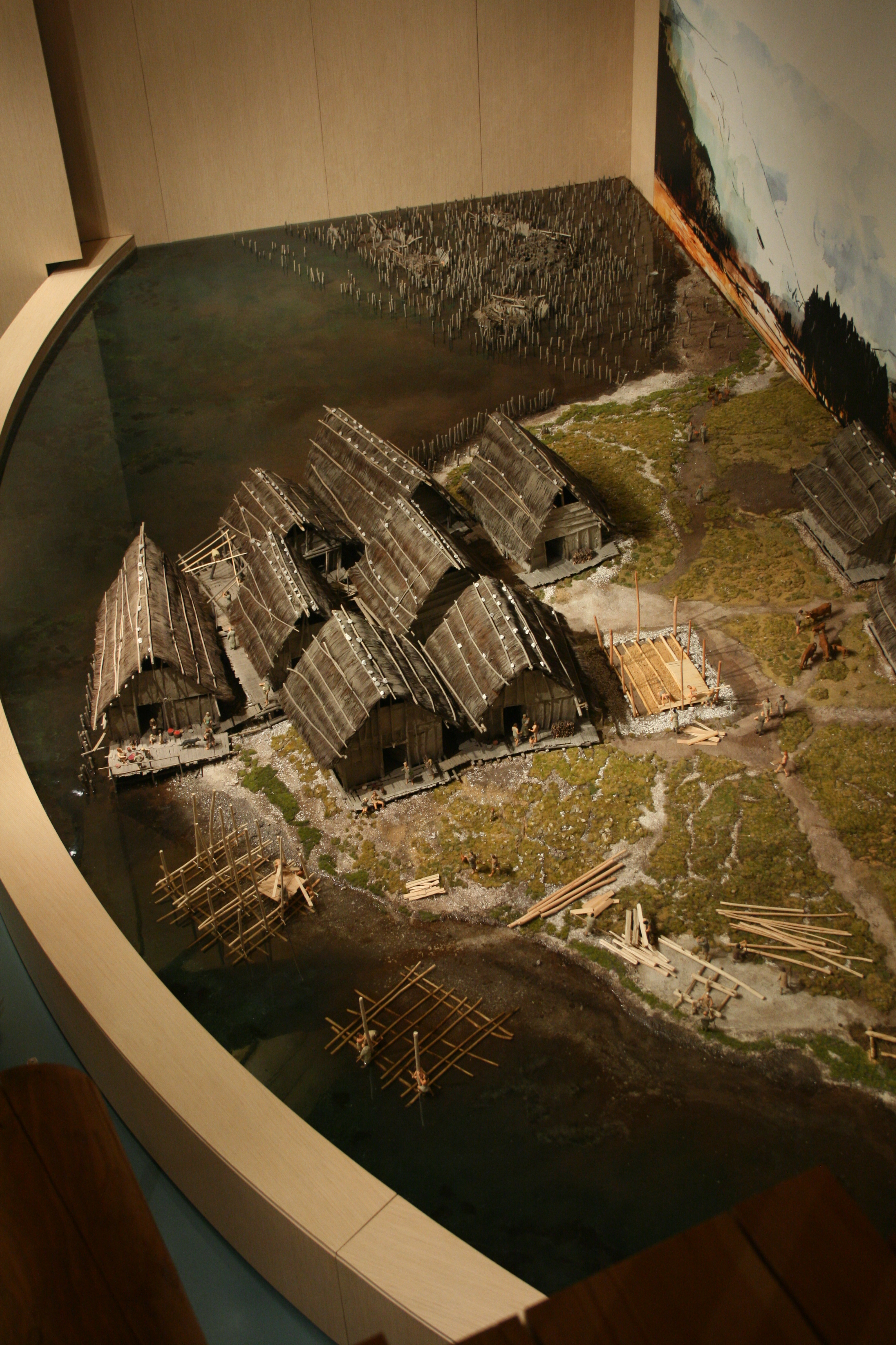 Il villaggio palafitticolo Fiavé 6 in fase di costruzione accanto al villaggio Fiavé 3-4-5 abbandonato